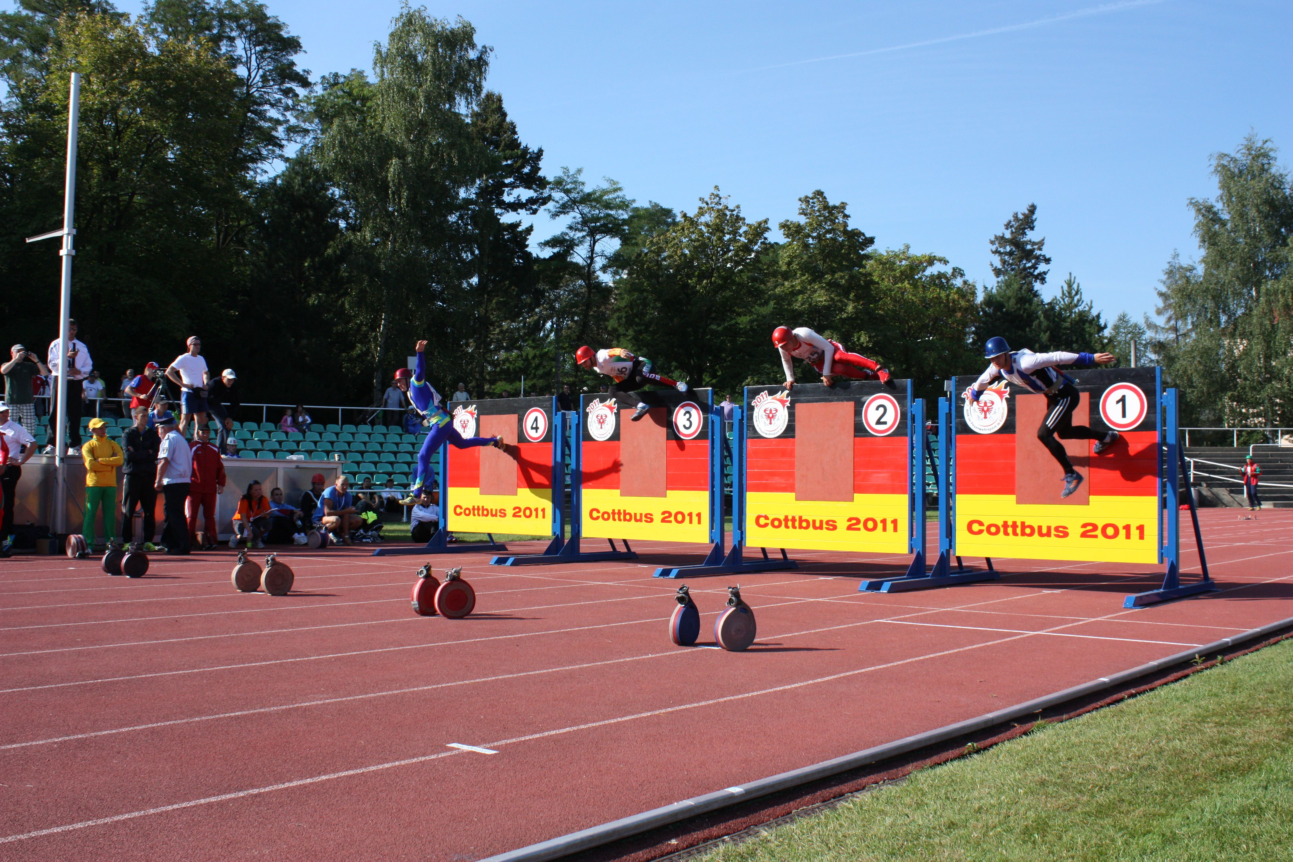 100-Meter-Hindernislauf beim der 7. WM im Feuerwehrsport in Cottbus